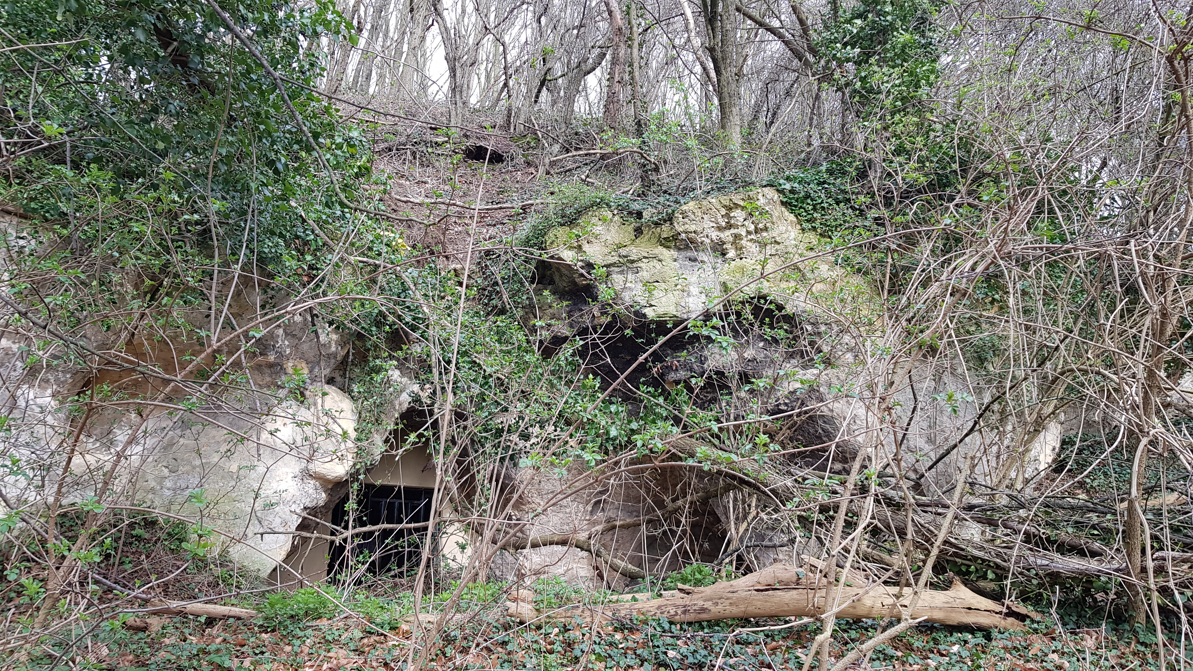 Mosterdberggroeve Zuid, Cadier en Keer, Nederland